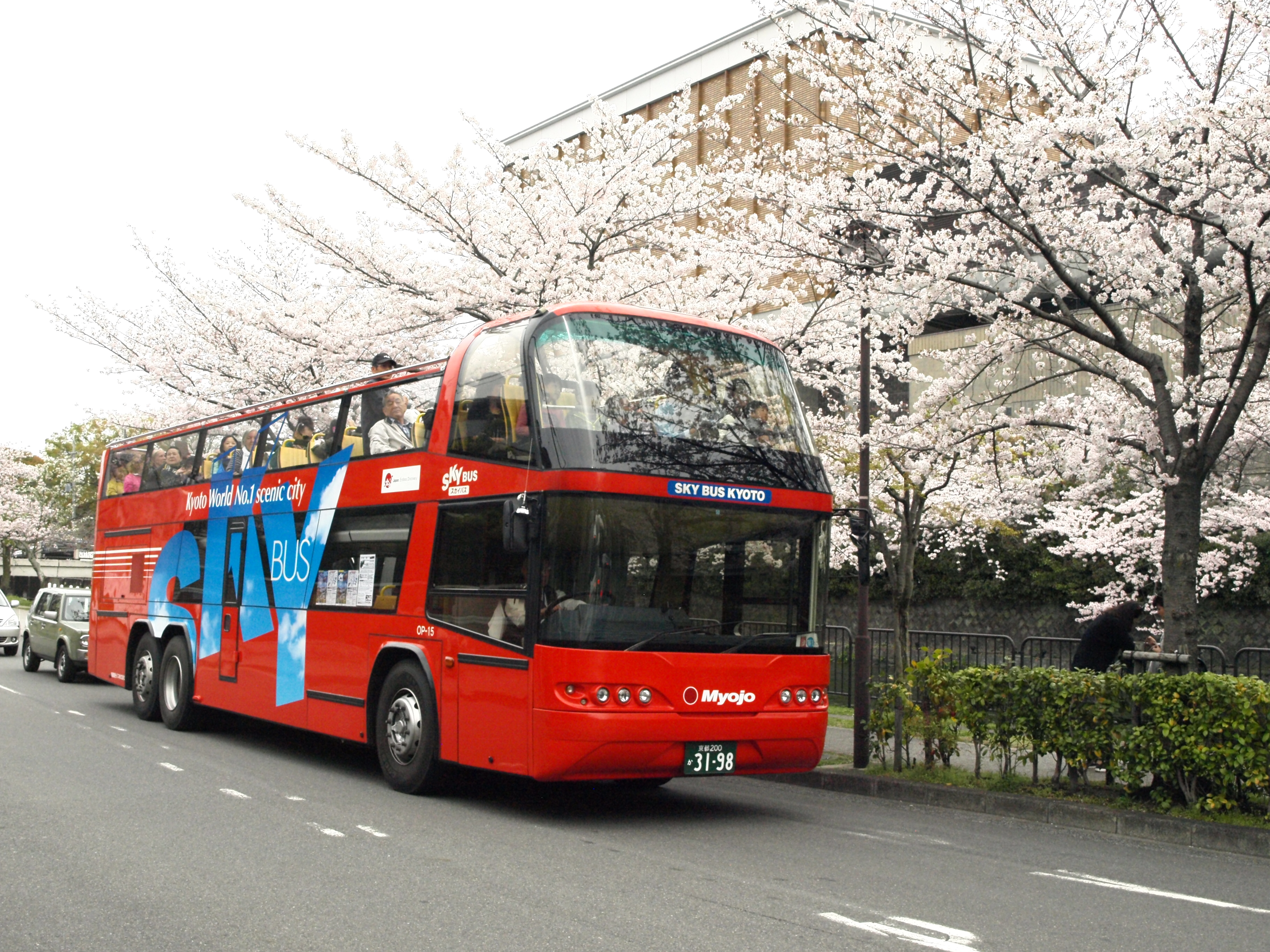 琵琶湖疏水と桜とスカイバス